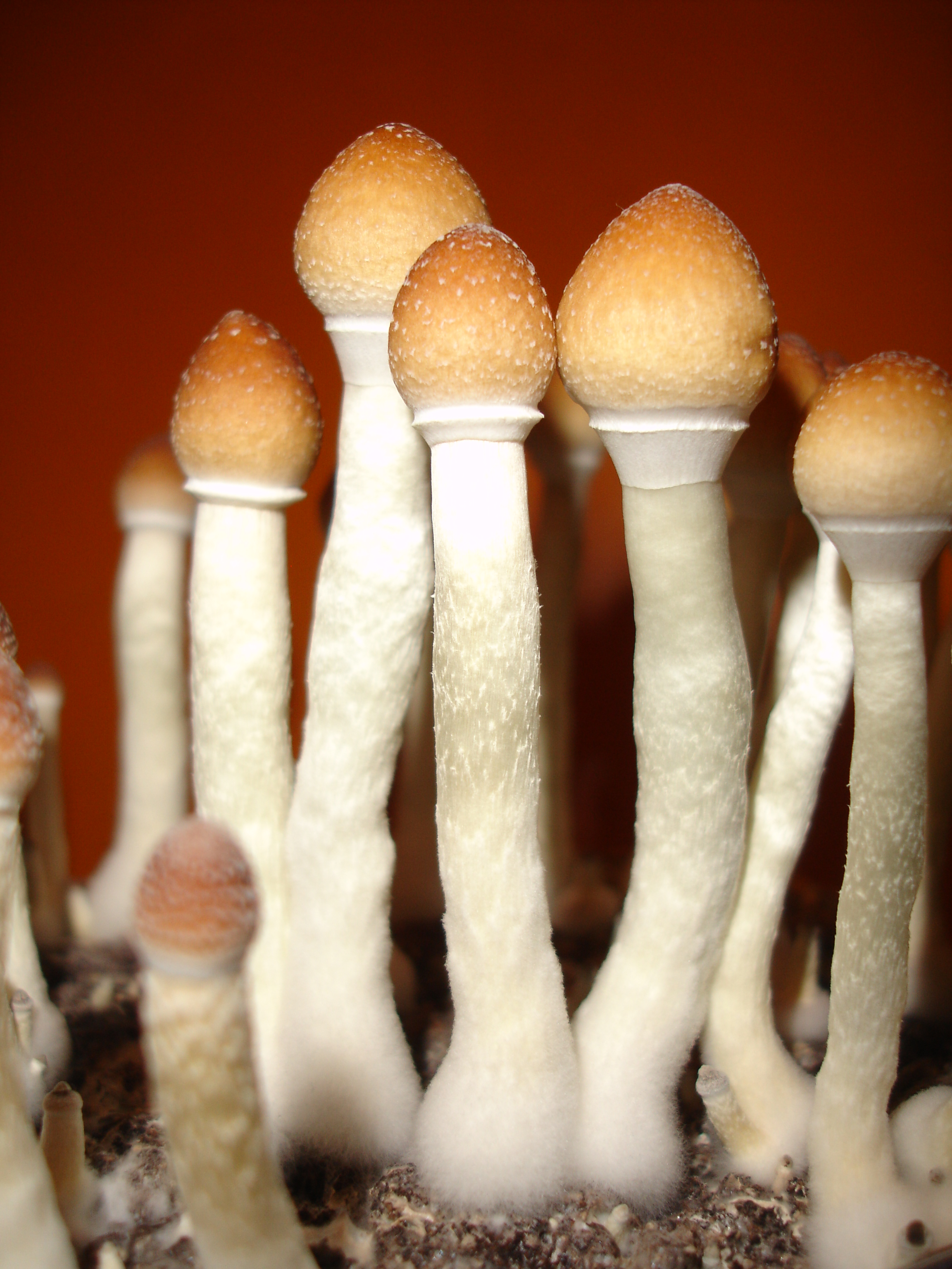 Psilocybe Cubensis Thai cultivadas en arroz integral, Tailandesas.